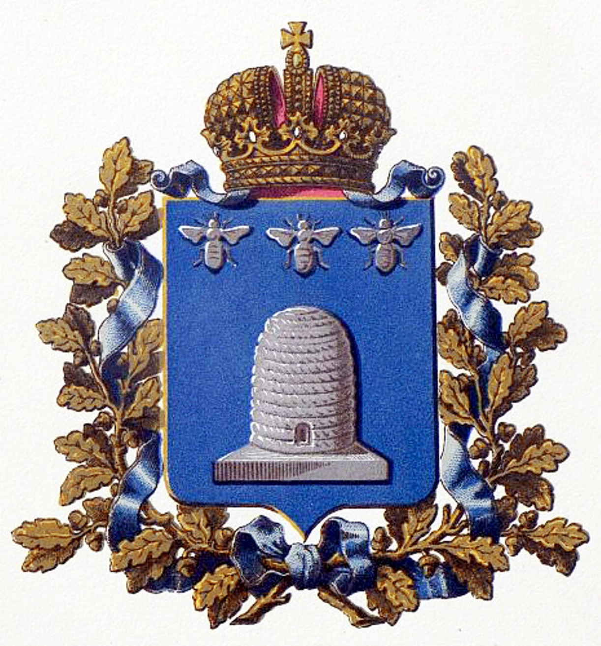 Official Russian Empire coat of arms Tambov Governorate. Герб Российской Империи Тамбовской губернии в Гербовнике МВД. Утверждён Императором Всероссийским Александром Вторым.